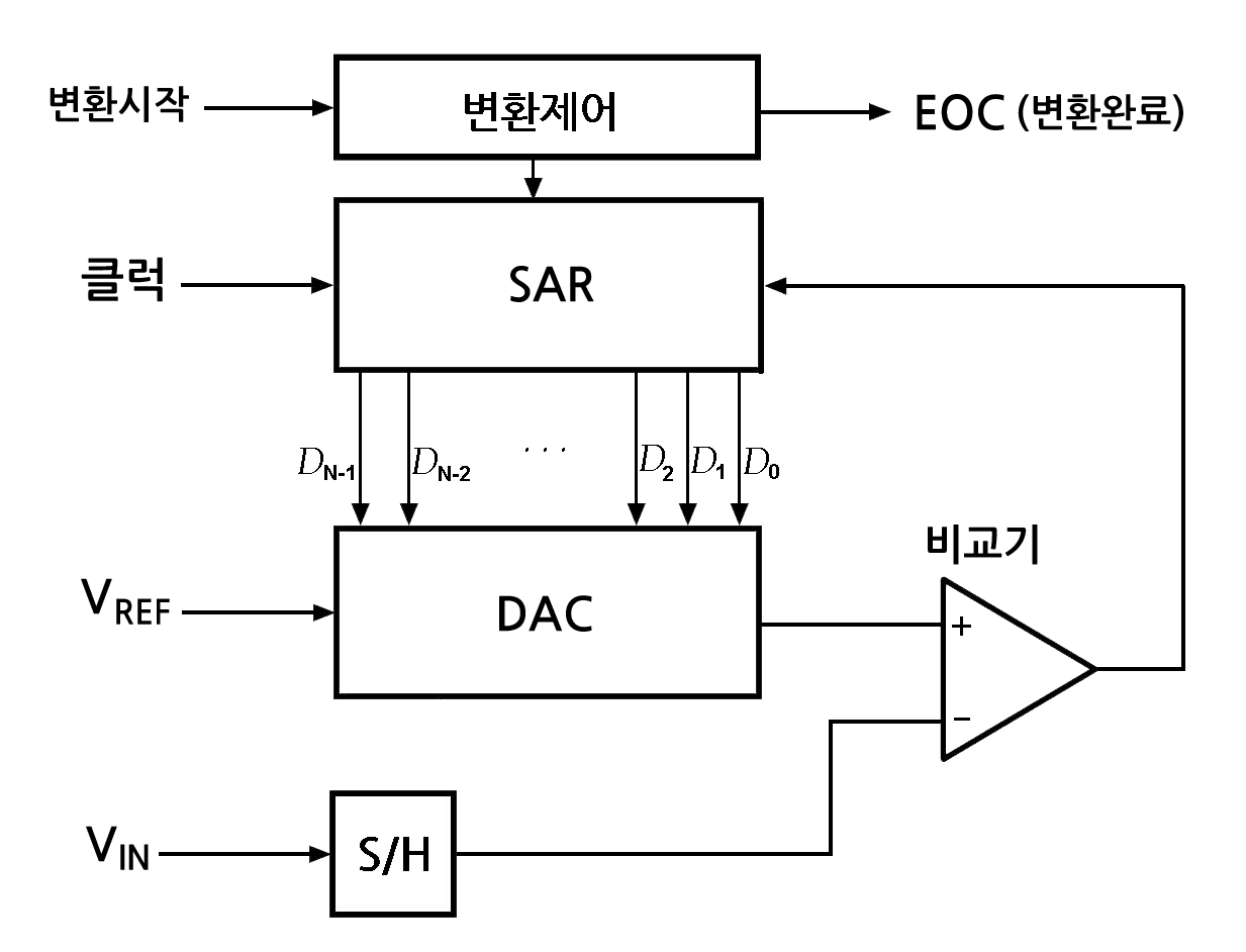 축차비교형 ADC 기능도